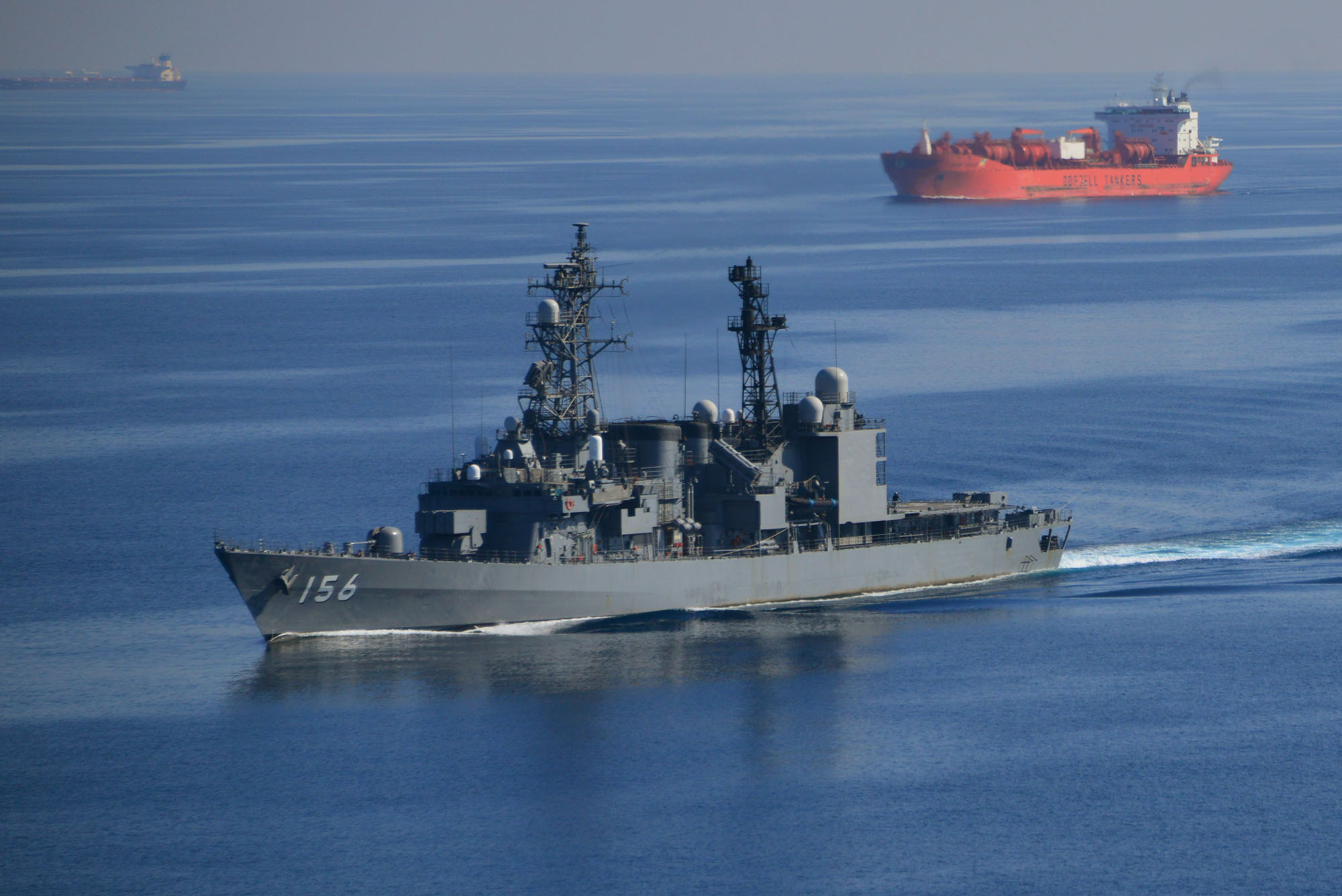 JMSDF Destroyer JS "Setogiri" in Deployment Surface Force Counter Piracy Enforcement